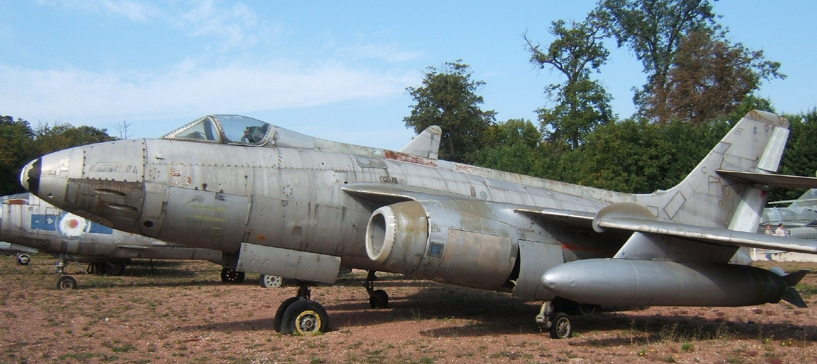 Vautour II A conservé au musée du château de Savigny-les-Beaunes